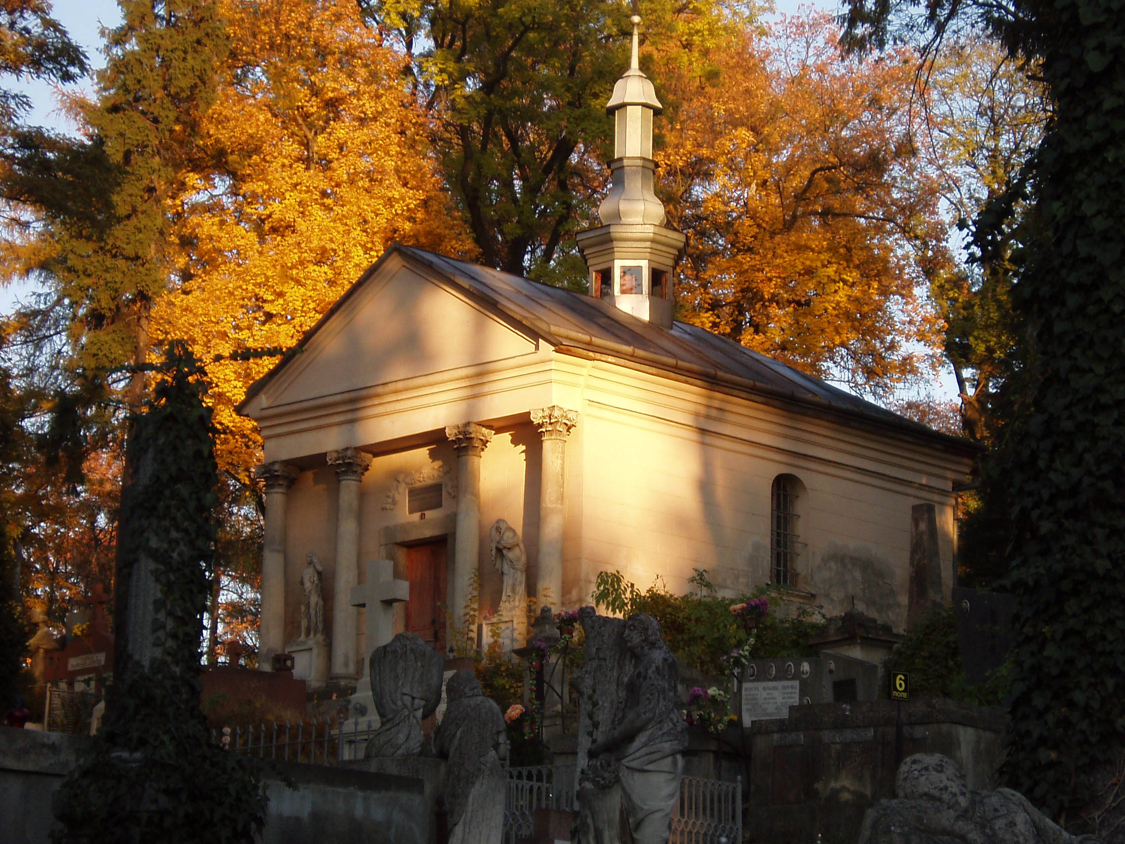 Каплиця Дунін-Борковських на Личаківському цвинтарі у Львові.